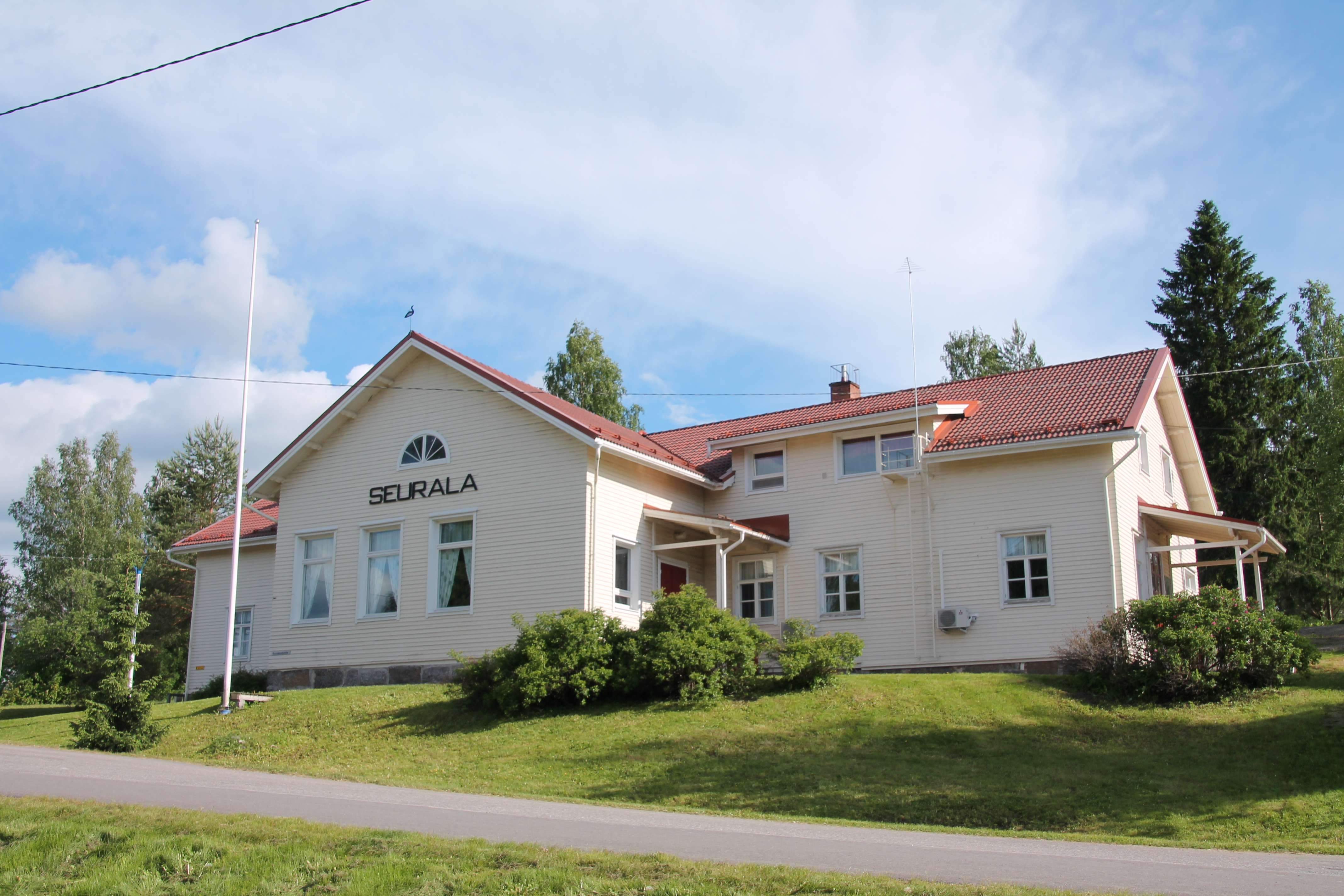 Seuralan talo Sorsakosken keskustassa